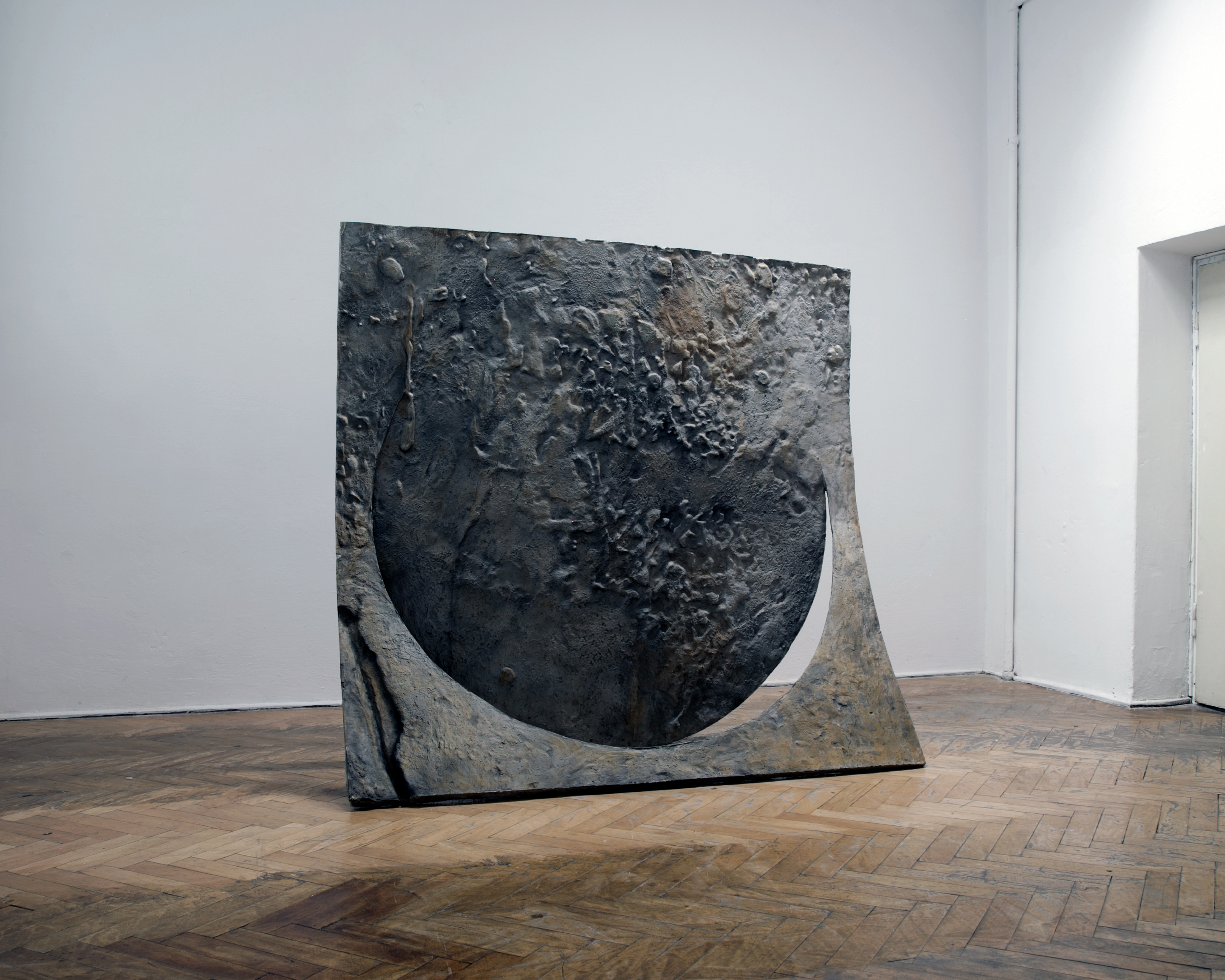 praca Szymona Kobylarza pt. Punkt, na który patrzę, zdjęcie autora